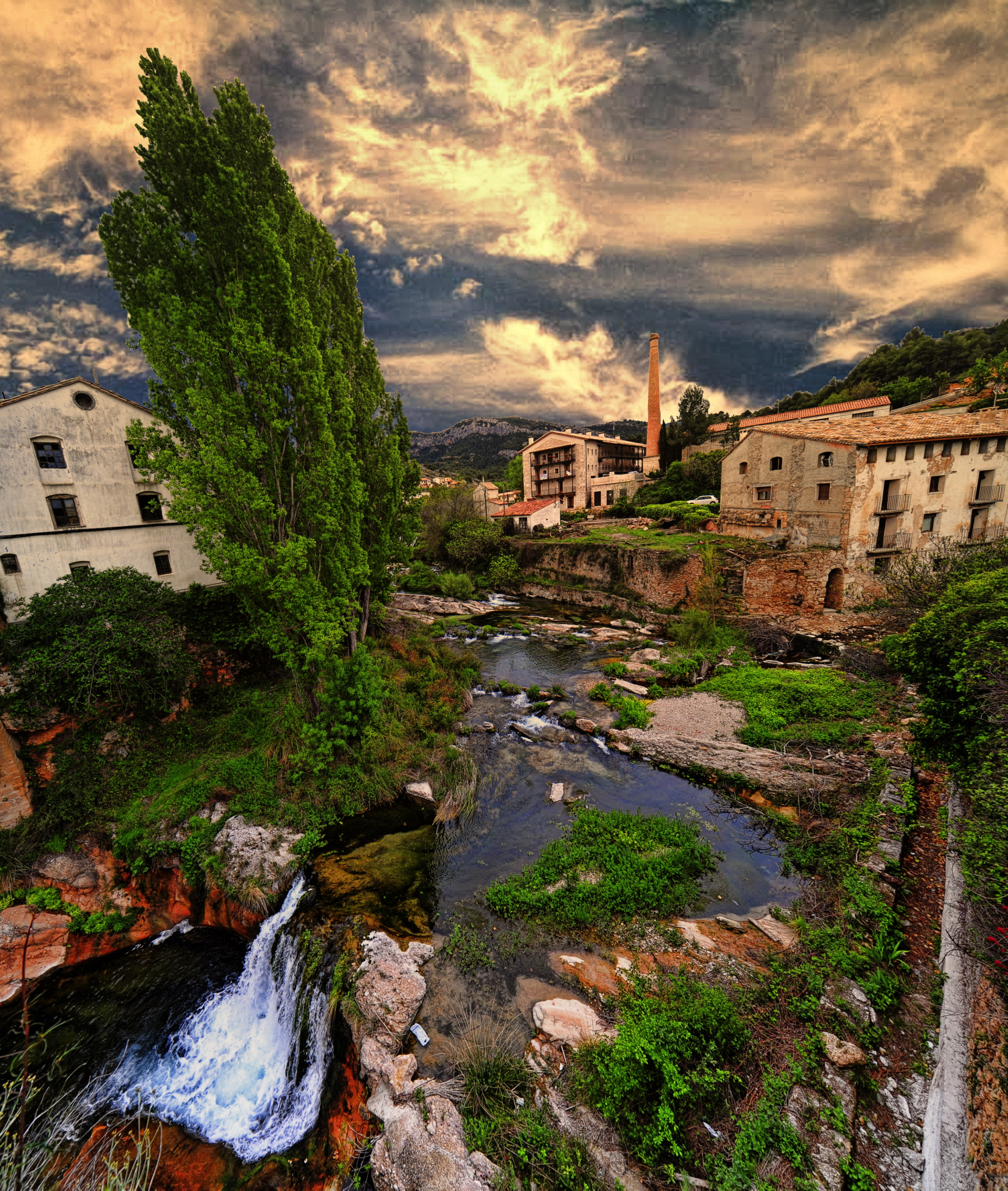 Beceite - Los molinos